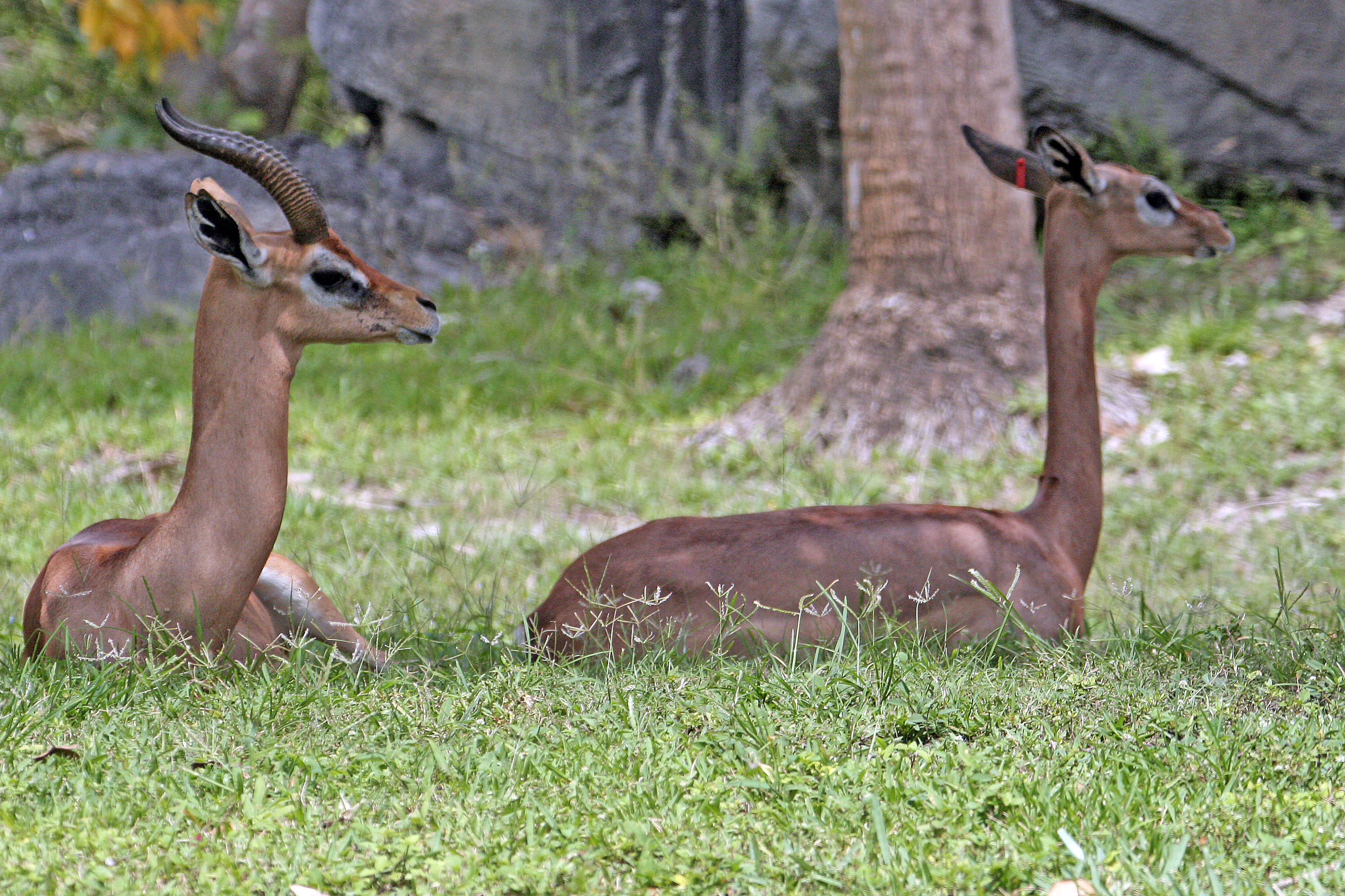 Male and female Giraffe-necked Antelope, Miami Metrozoo